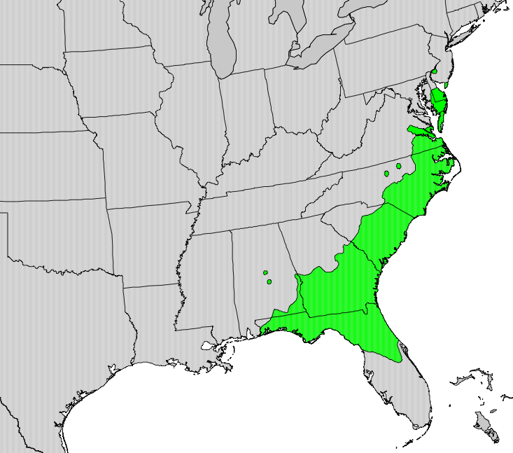 Range map of Pinus serotina